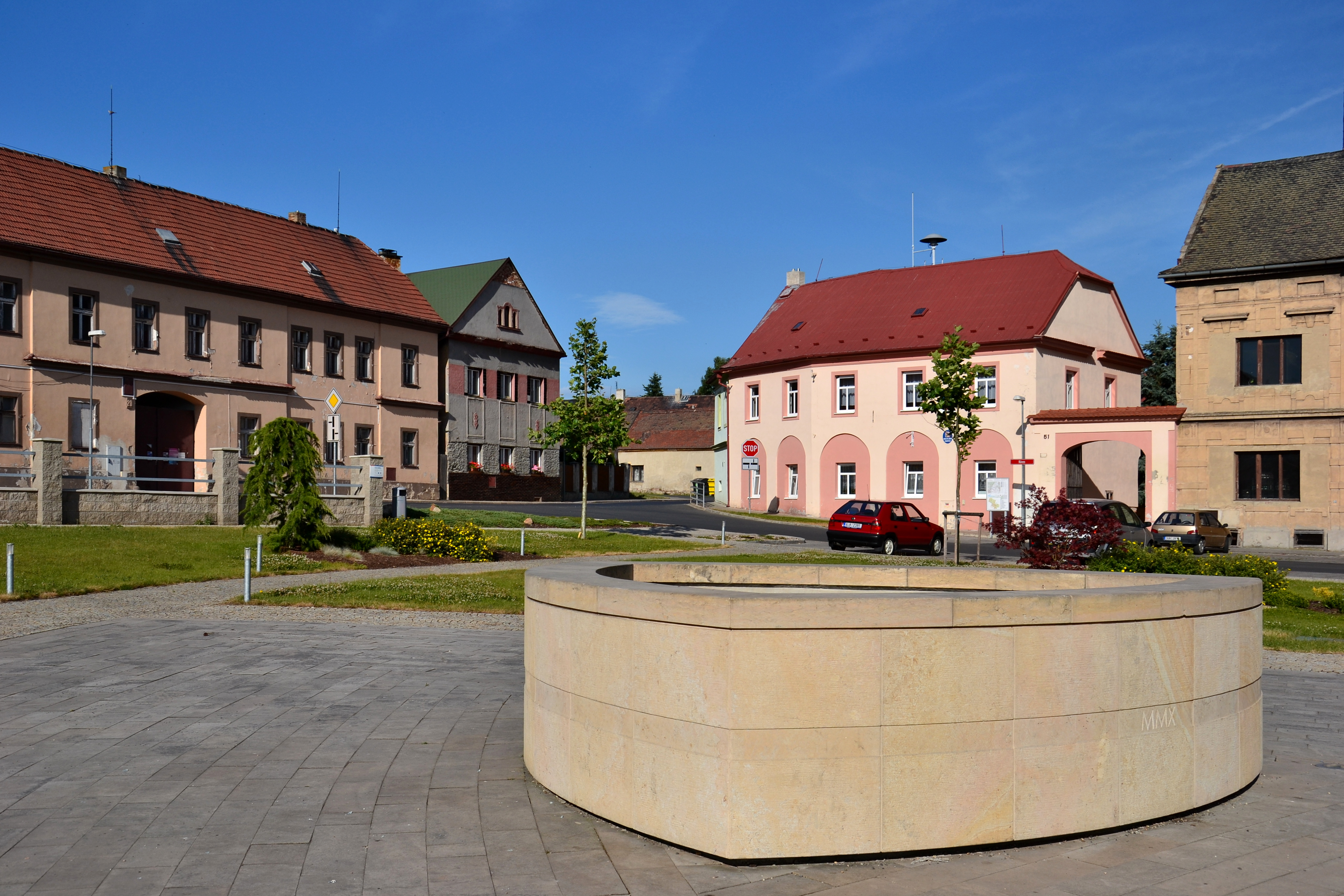 Strupčice - náves s kašnou